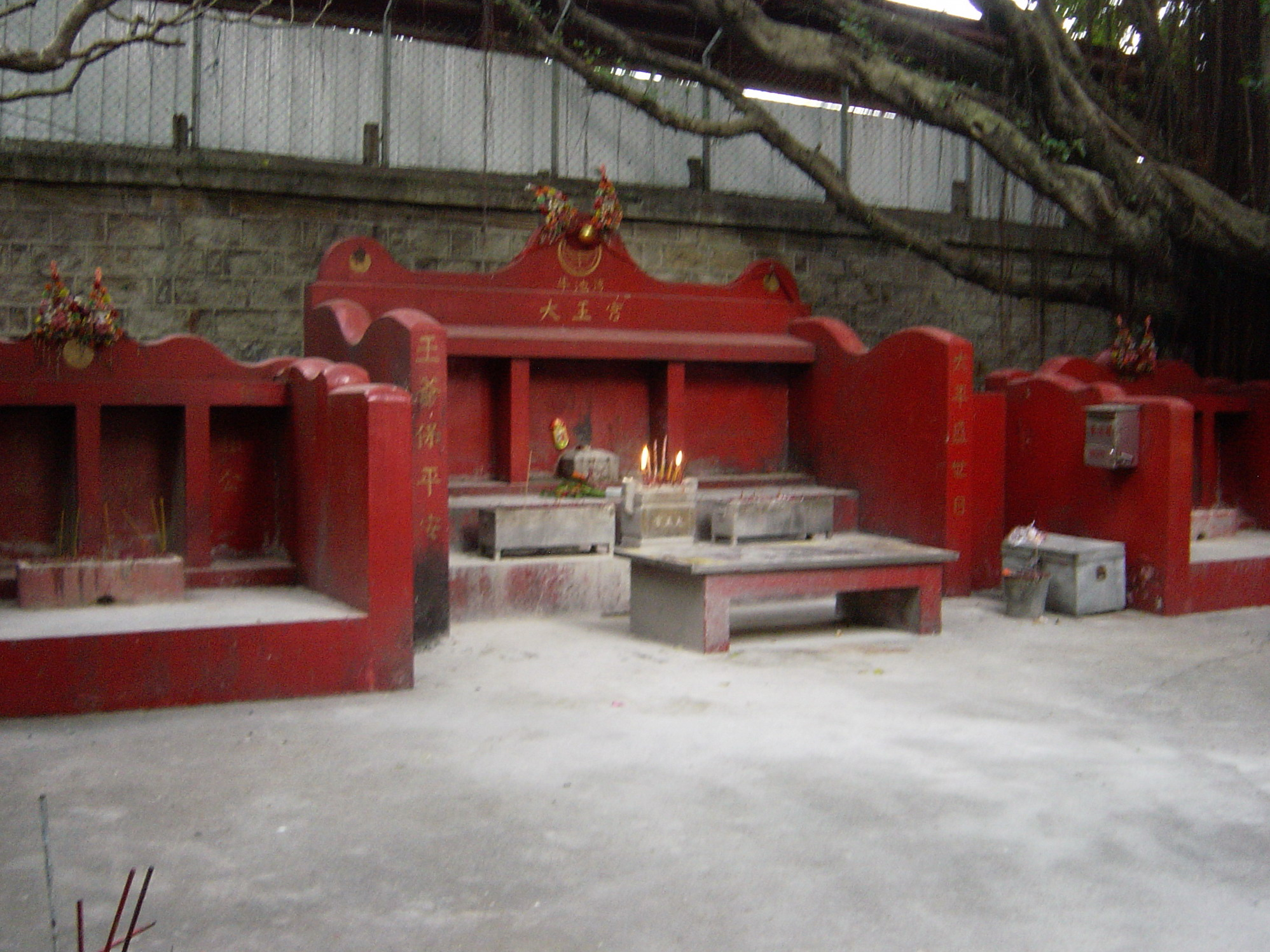 香港牛池灣村大王宮。Da Wang Gong Temple, Ngau Chi Wan, Hong Kong.